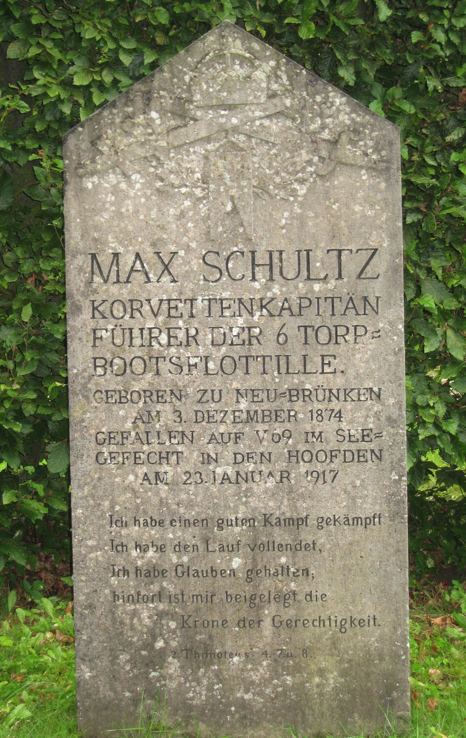 Gedenkstein für Korvettenkapitän Max Schultz auf dem Ehrenfriedhof von Wilhelmshaven